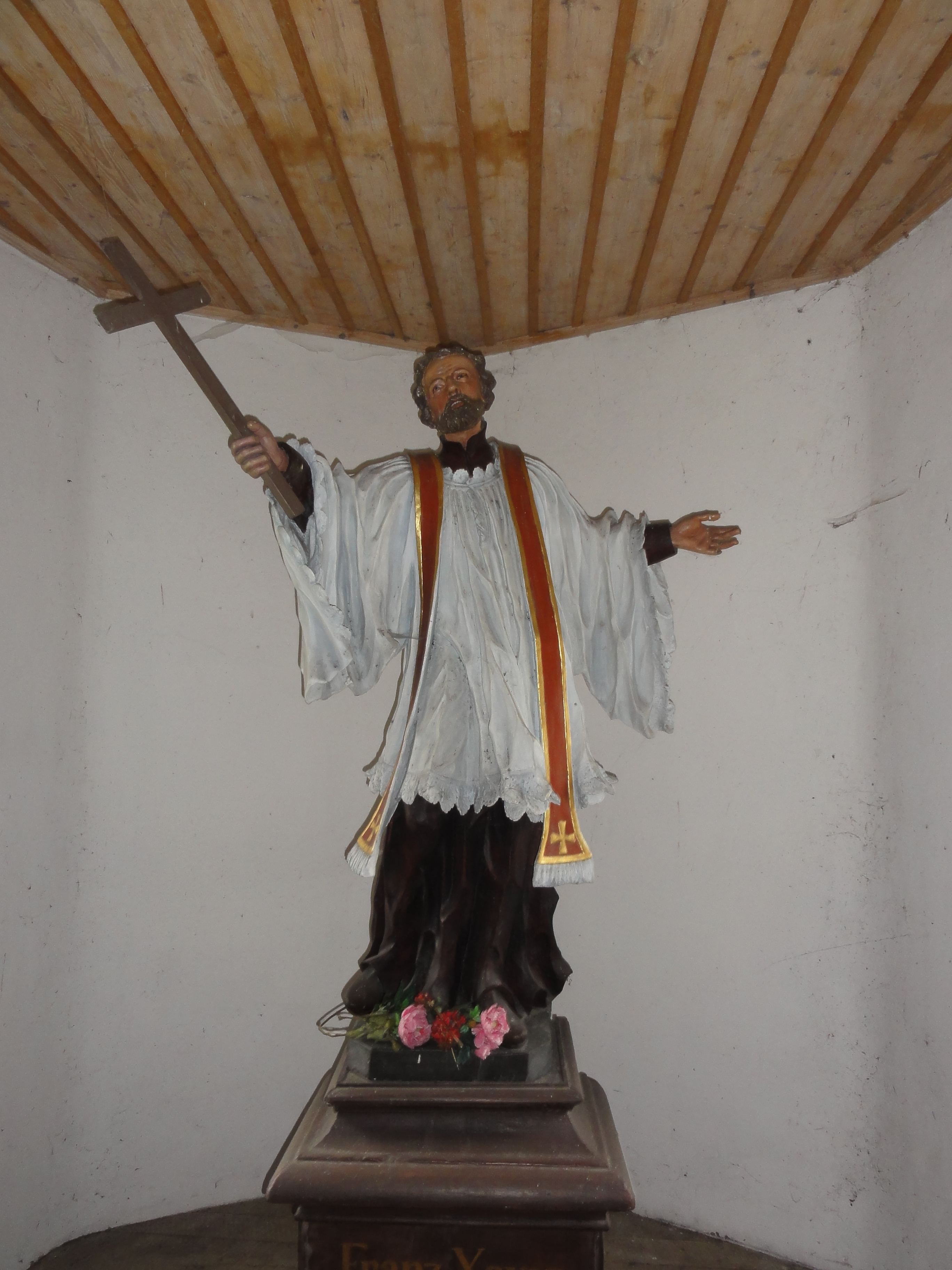 Bad Säckingen, Holzbrücke - Holzfigur des Hl. Franz Xaver (geschaffen um 1700), auf Schweizer Seite befindet sich eine etwa gleich große Holzfigur des hl. Johannes Nepomuk (s.u.) Info GPS data may be inaccurate. EXIF data regarding date and time may be inaccurate.